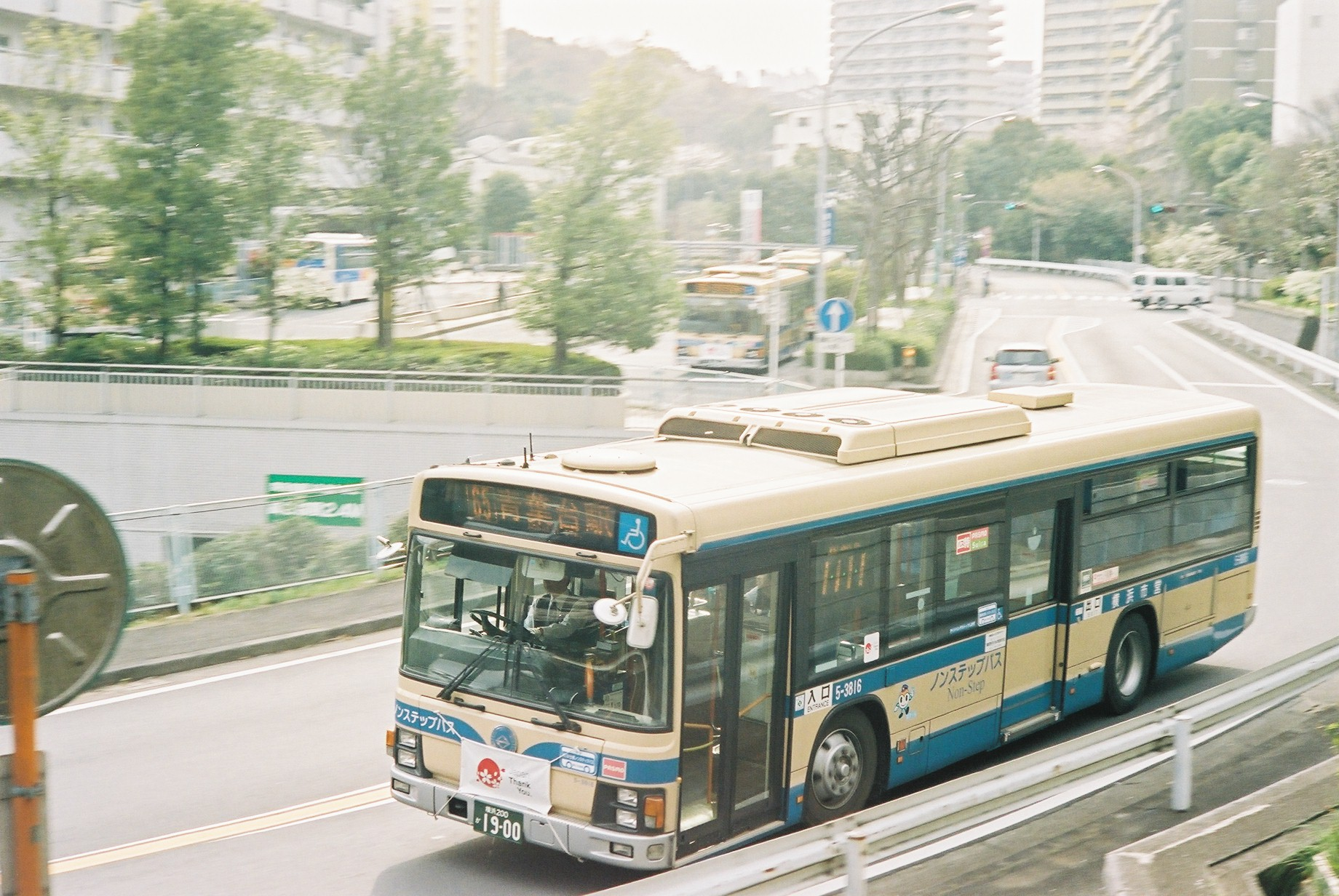 若葉台中央バスロータリーを出発する横浜市営バス65系統、2012年4月10日撮影